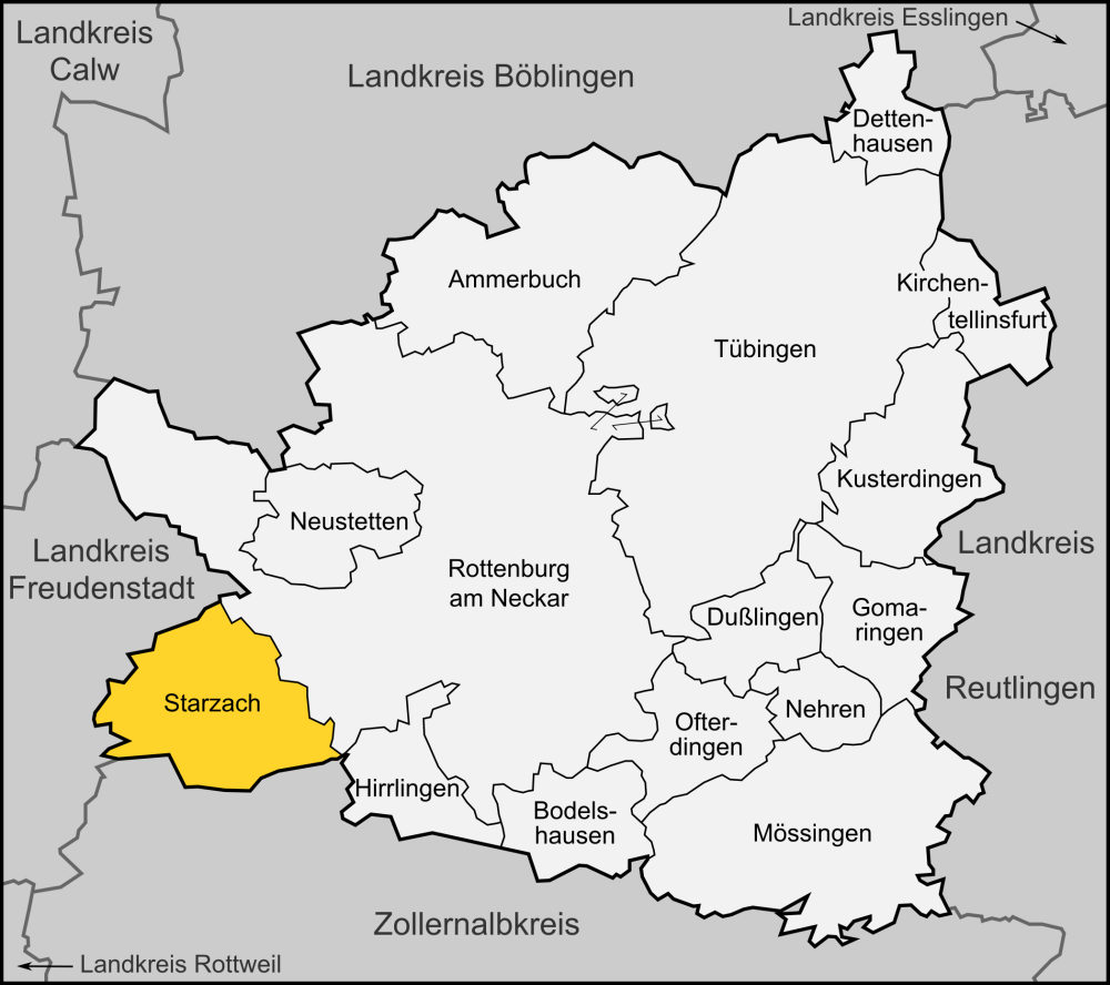 Karte der Gemeinde Starzach im Landkreis Tübingen